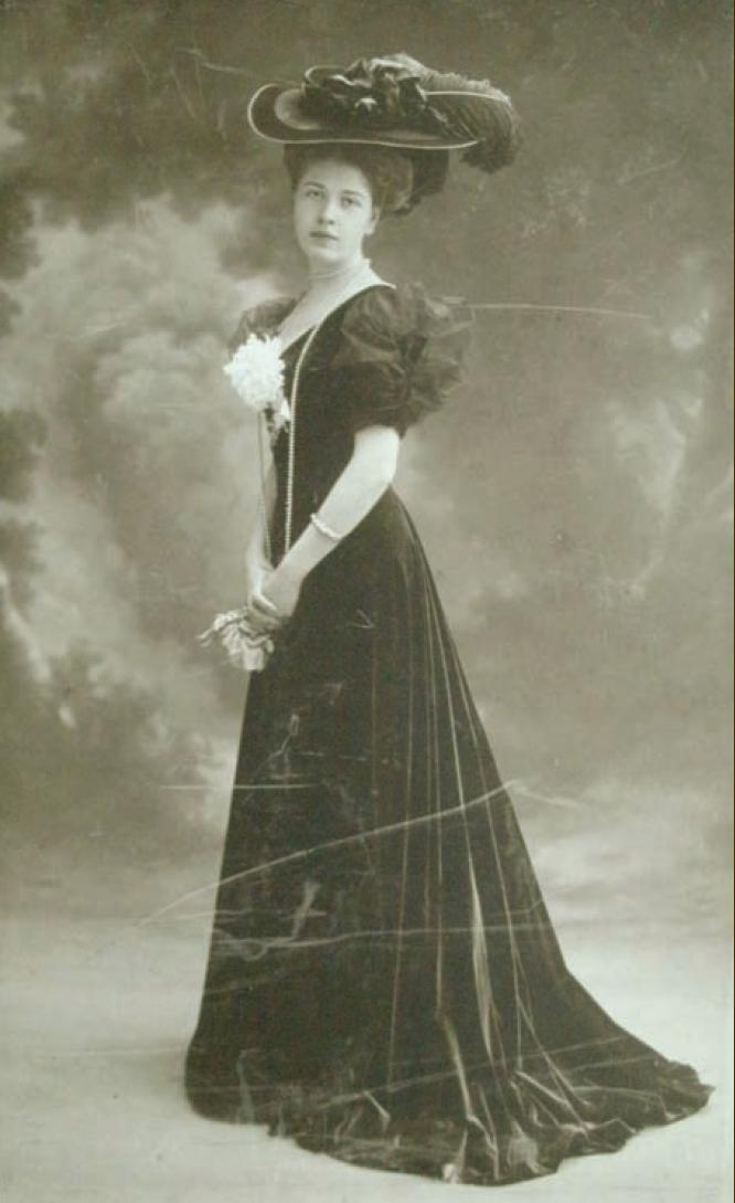 Елизавета (Элла) Фёдоровна Демидова, ур. Трепова (1885—1978)